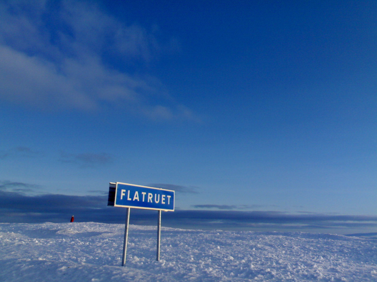 Flatruet ("flat mountain") in Härjedalen, Sweden